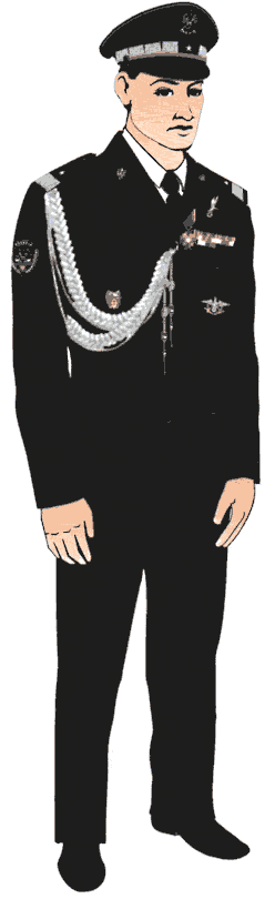 Umundurowanie wyjściowe generała - do wystąpień uroczystych - ze sznurem wyjściowym generała. Obowiązujące w latach 2005-2010